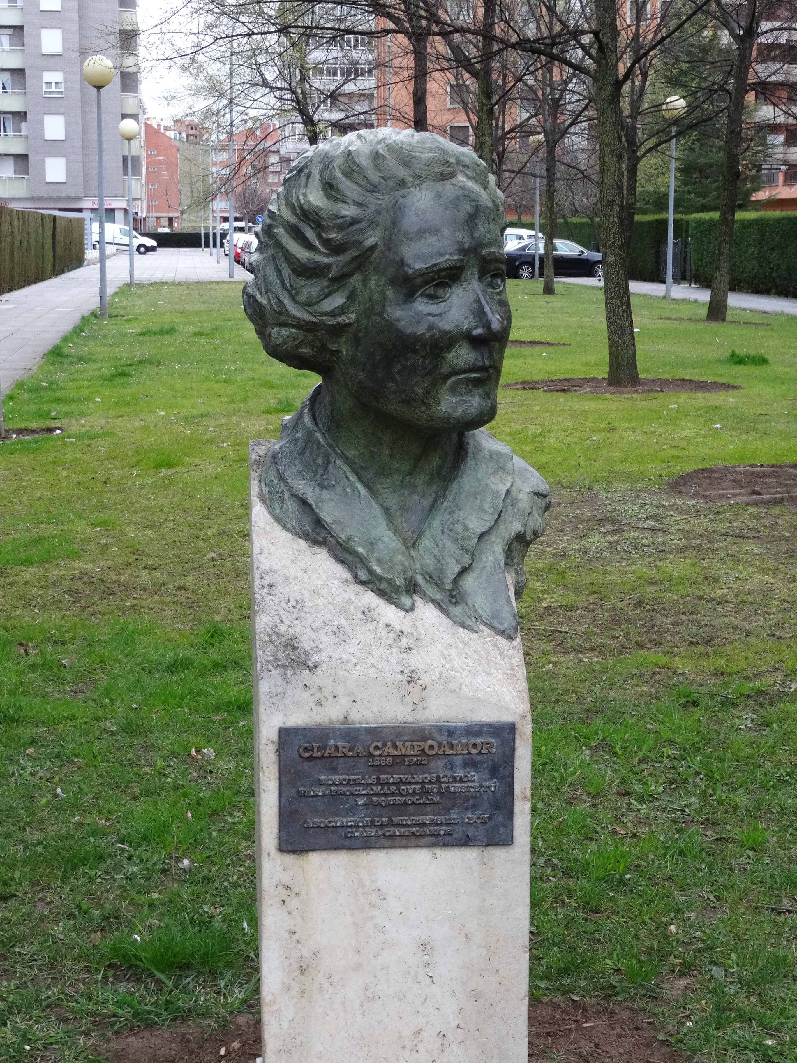 Busto de Clara Campoamor en León.